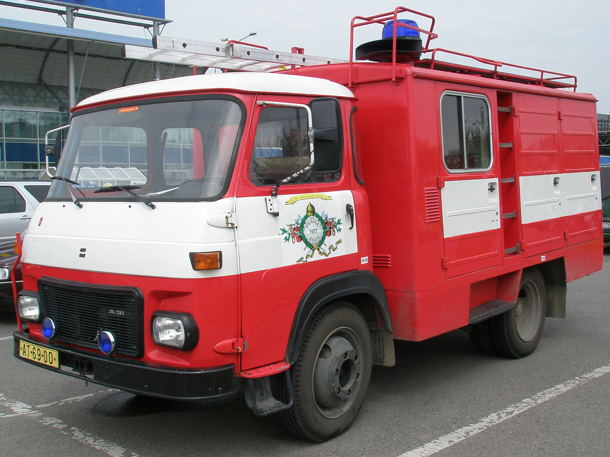 Avia A31 – funkční vozidlo SDH Zličín na parkovišti u Makra v pražských Stodůlkách